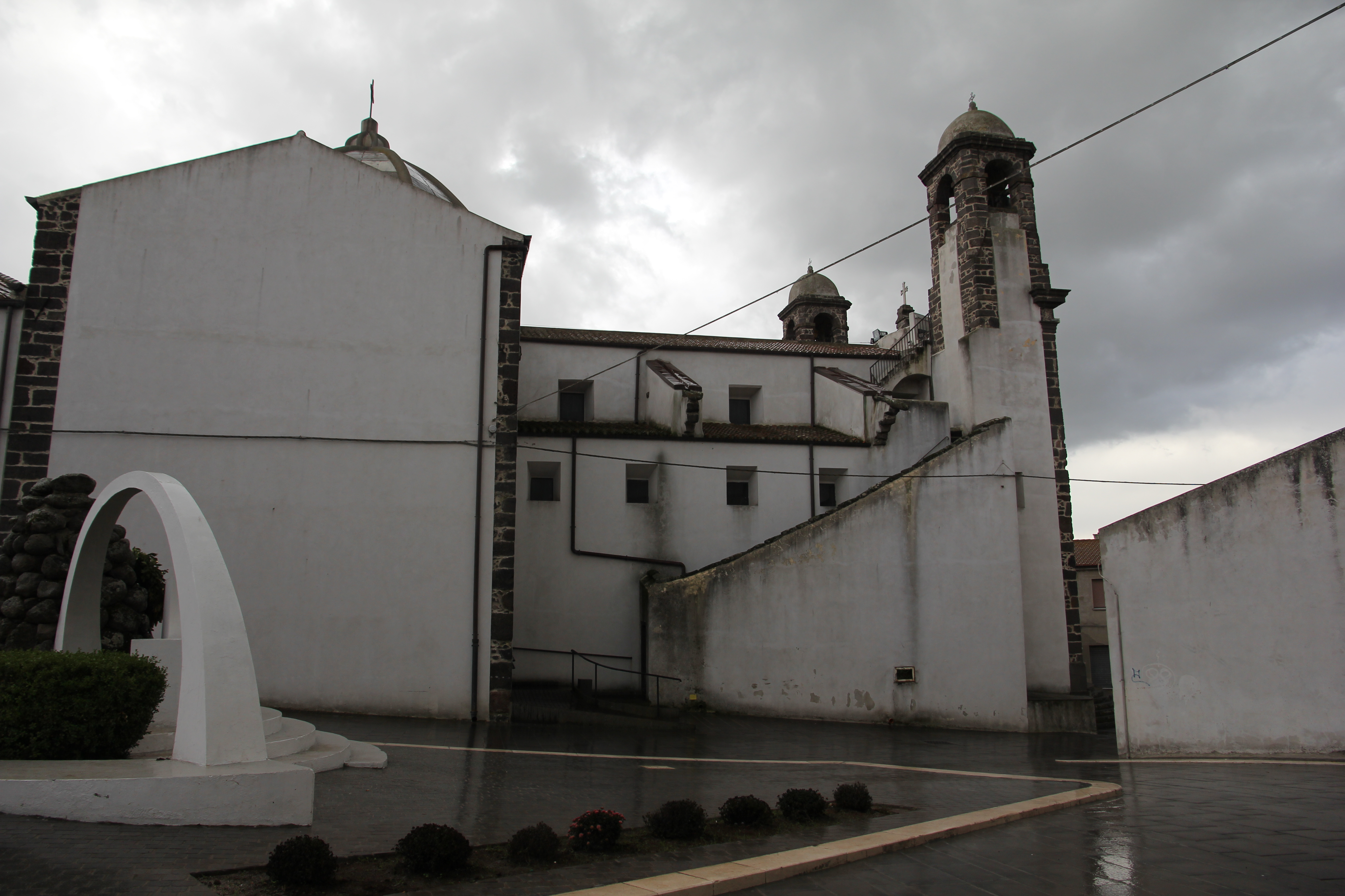 Borore - Chiesa della Beata Vergine Assunta